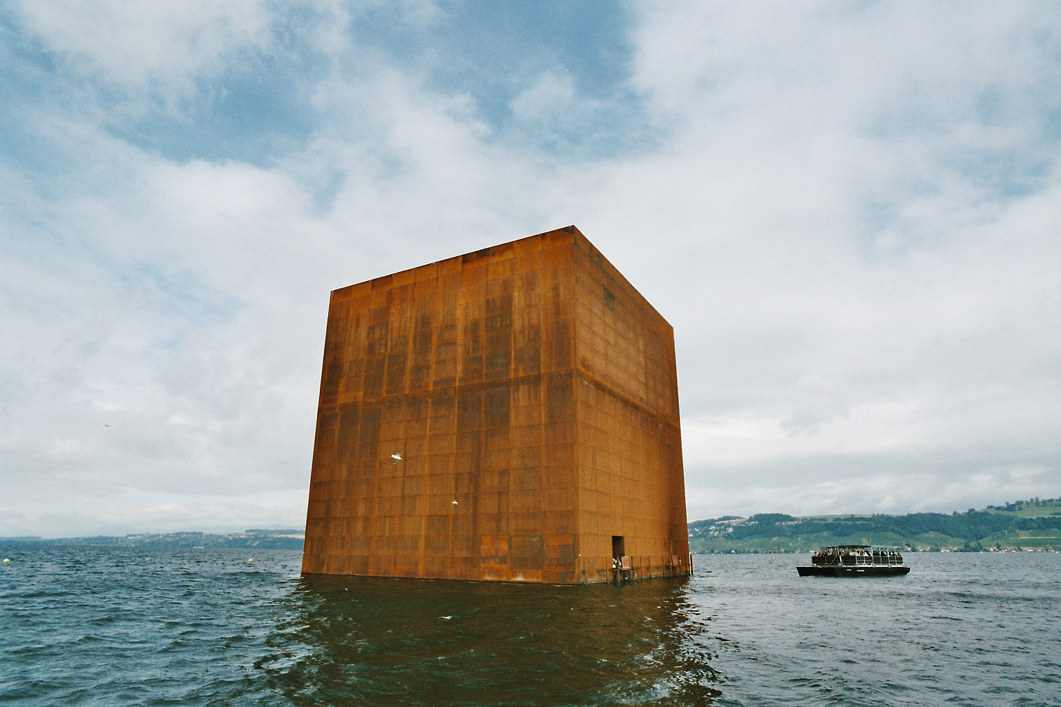 Expo.02 in Murten/Morat, Switzerland